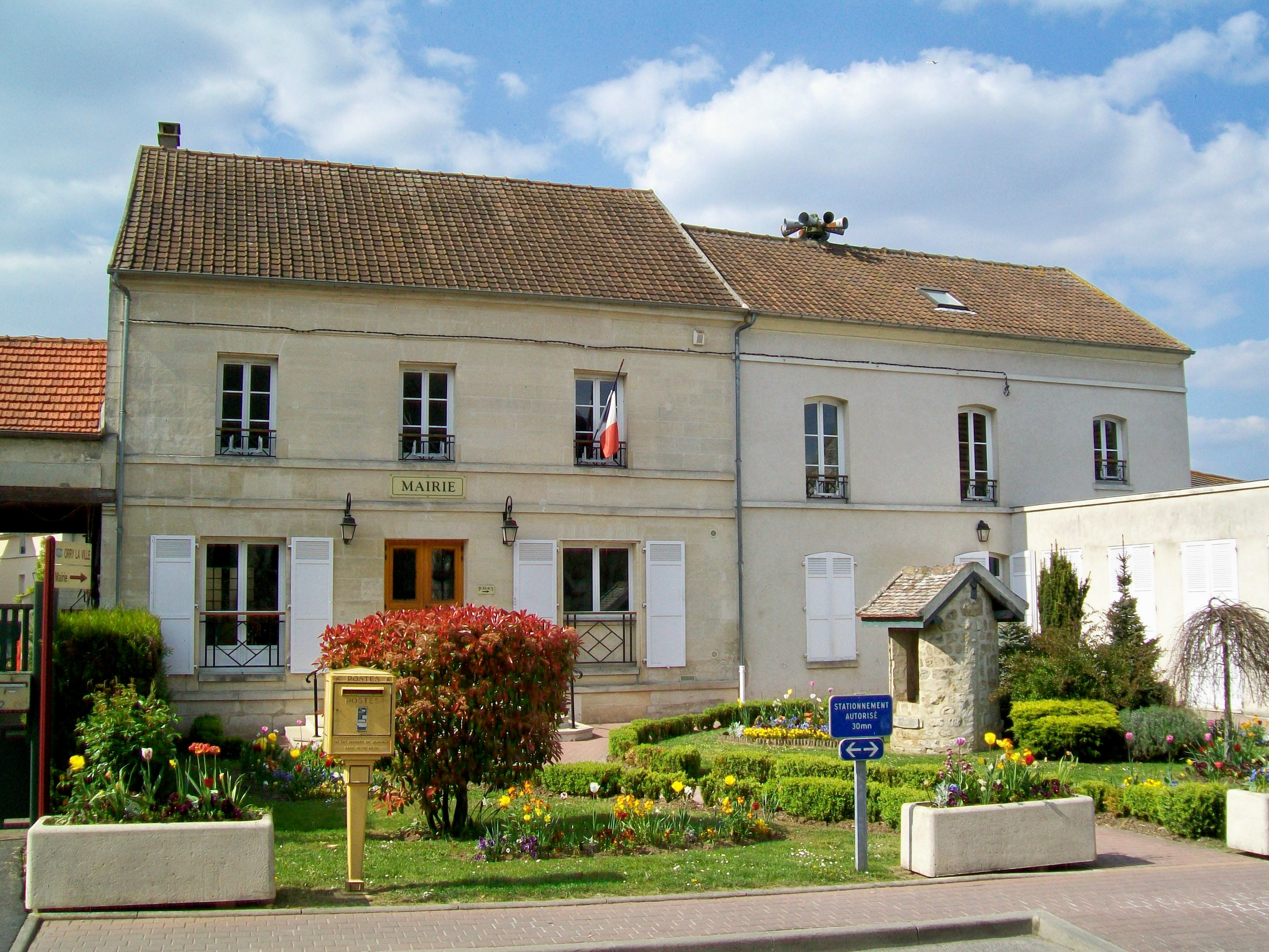 La mairie d'Orry, située face à l'église.